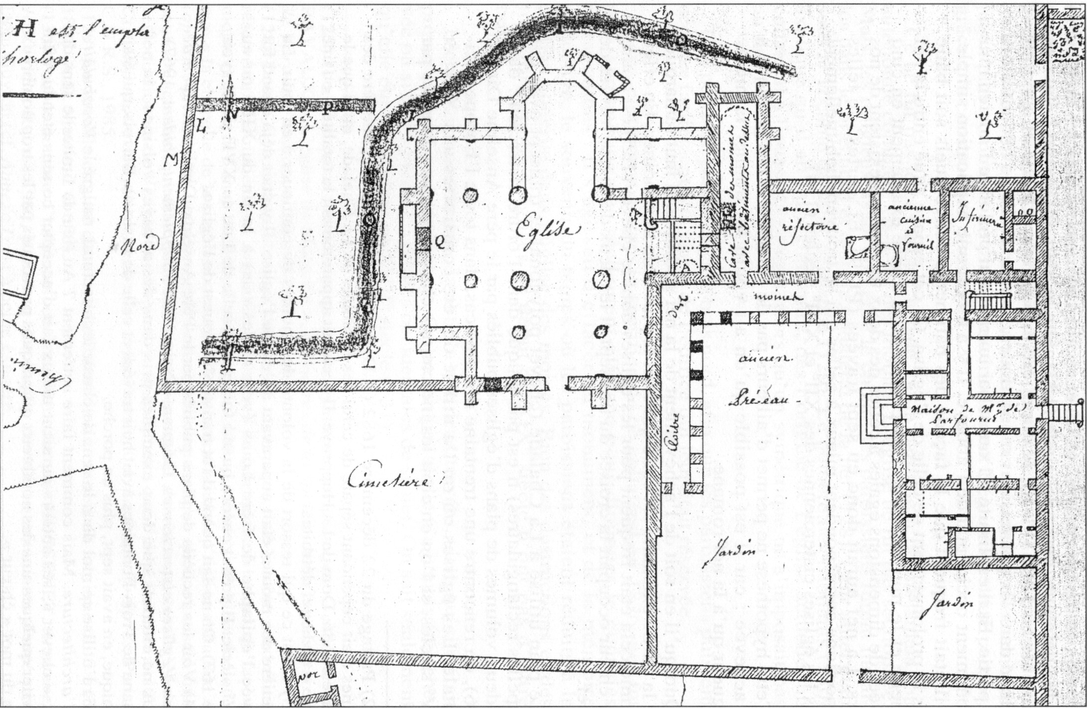 Abtei La Chalade, Grundriss im Jahr 1822